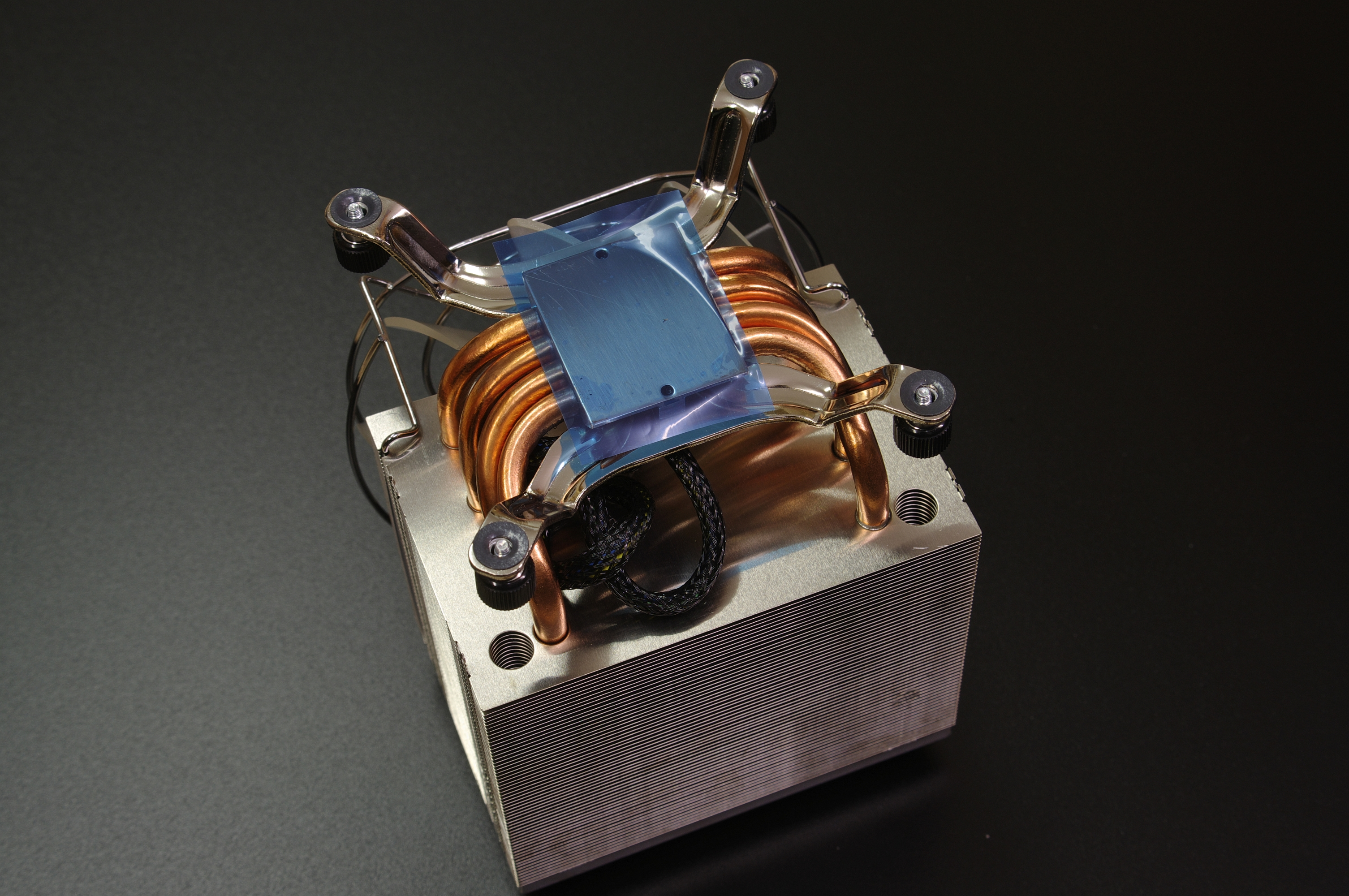 Intel-Kühler für Socket 1366, mit Schutzfolie über der Kontaktfläche